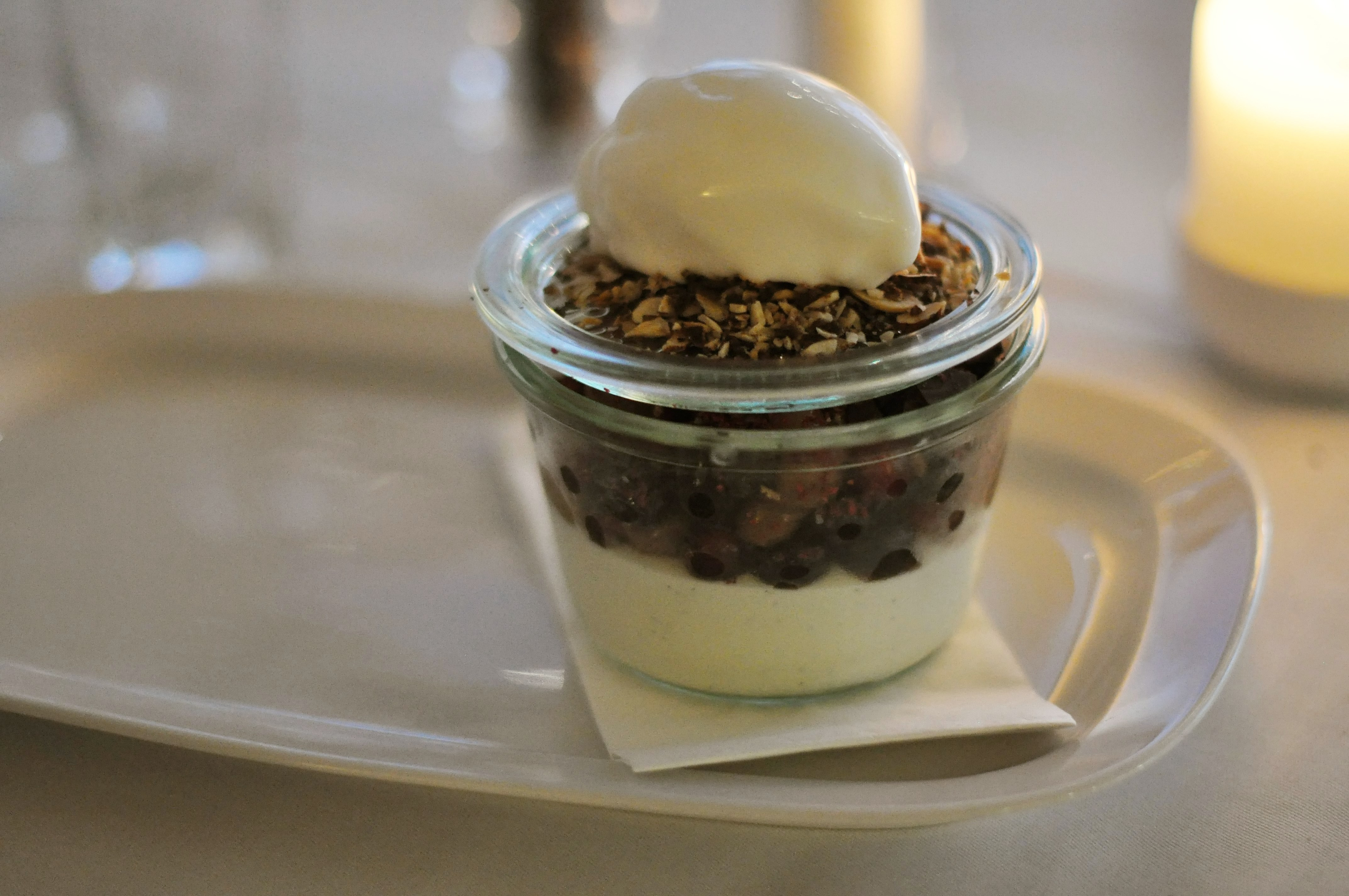 Ymermousse med bær, karamel og hyldeblomstsorbet (Ymer mousse with berries, caramel and elderflower sorbet)